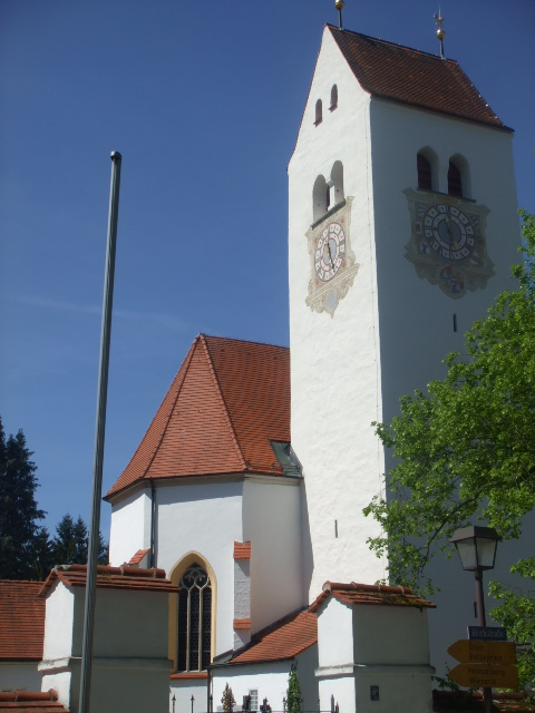 Betzigau, Landkreis Oberallgäu, Pfarrkirche St. Afra Turm aus dem 16. Jahrhundert